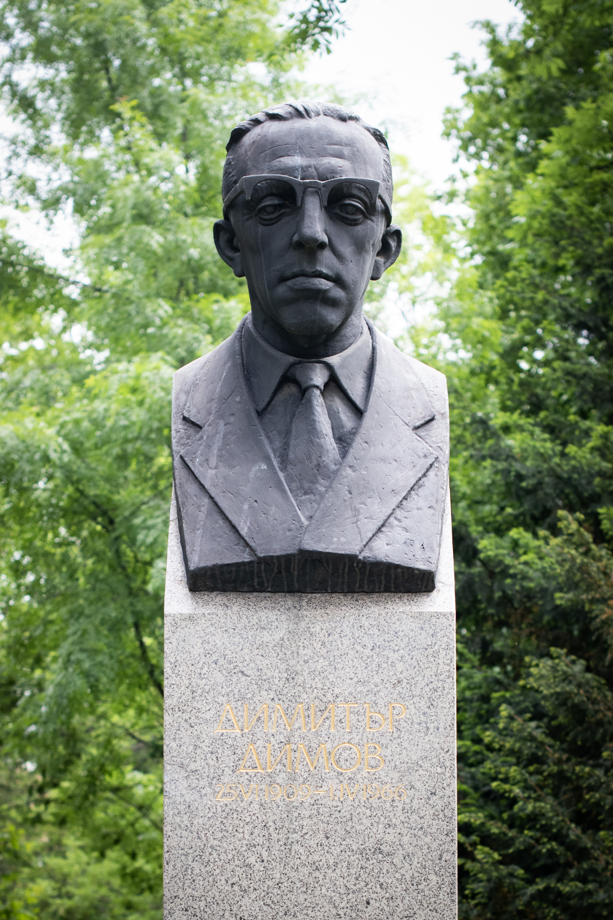 Паметник на Димитър Димов в парк "Борисова градина", София.